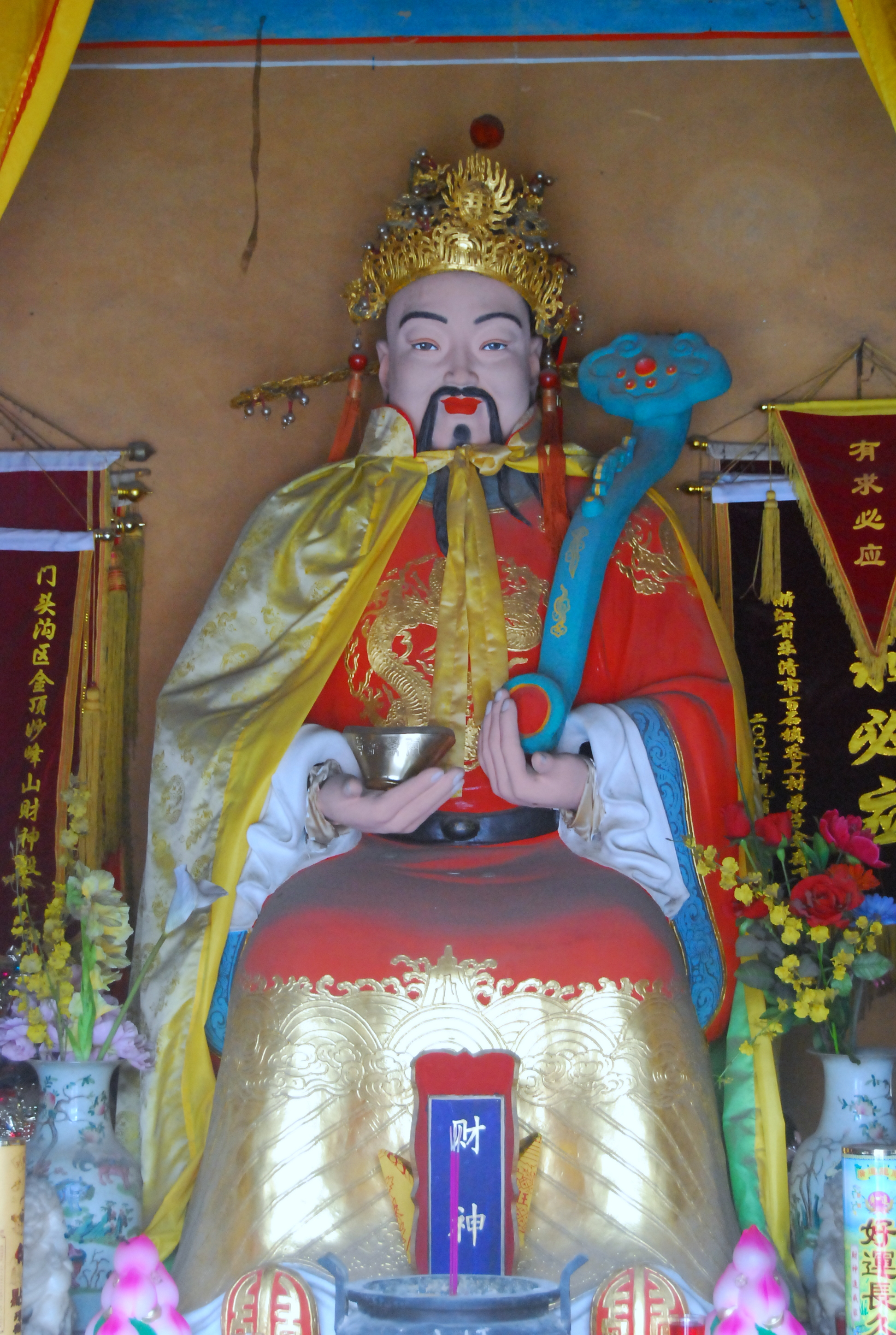 妙峰山娘娘庙财神